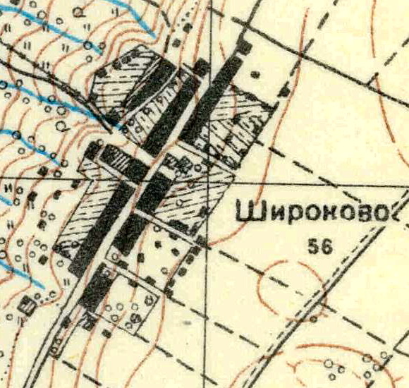 Топографическая карта Ленинградской области, квадрат О-35-11-В-в (Копорье), деревня Широково